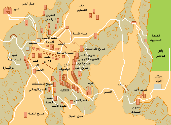 خريطة أثرية لمواقع مدينة البتراء، الأردن